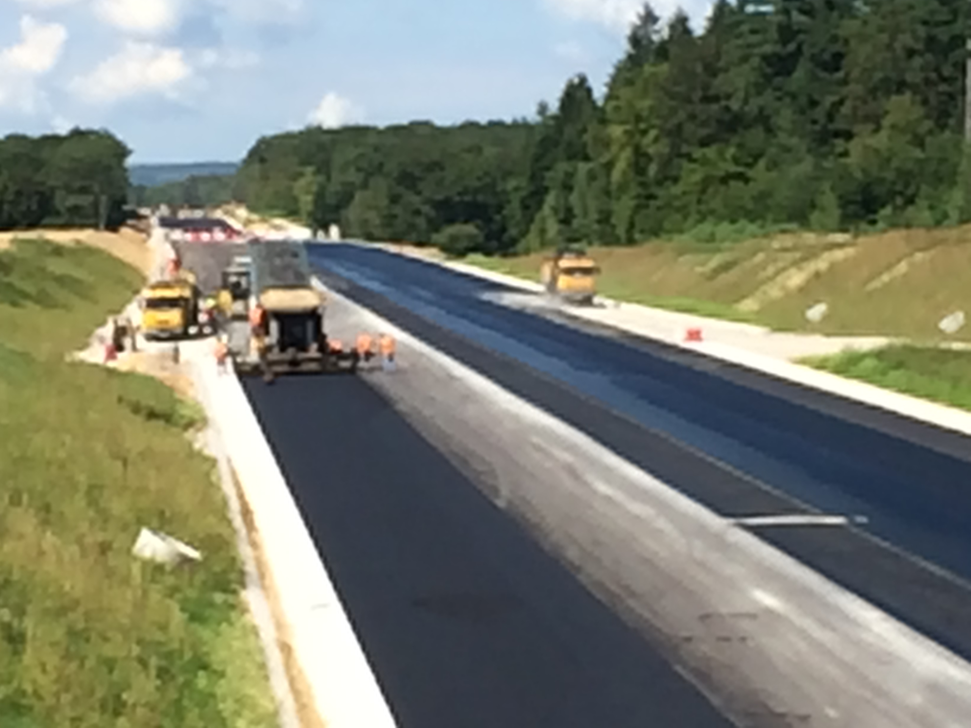 Travaux de prolongement de la Route nationale 19 à quatre voix en direction de Vesoul au départ de Lure.